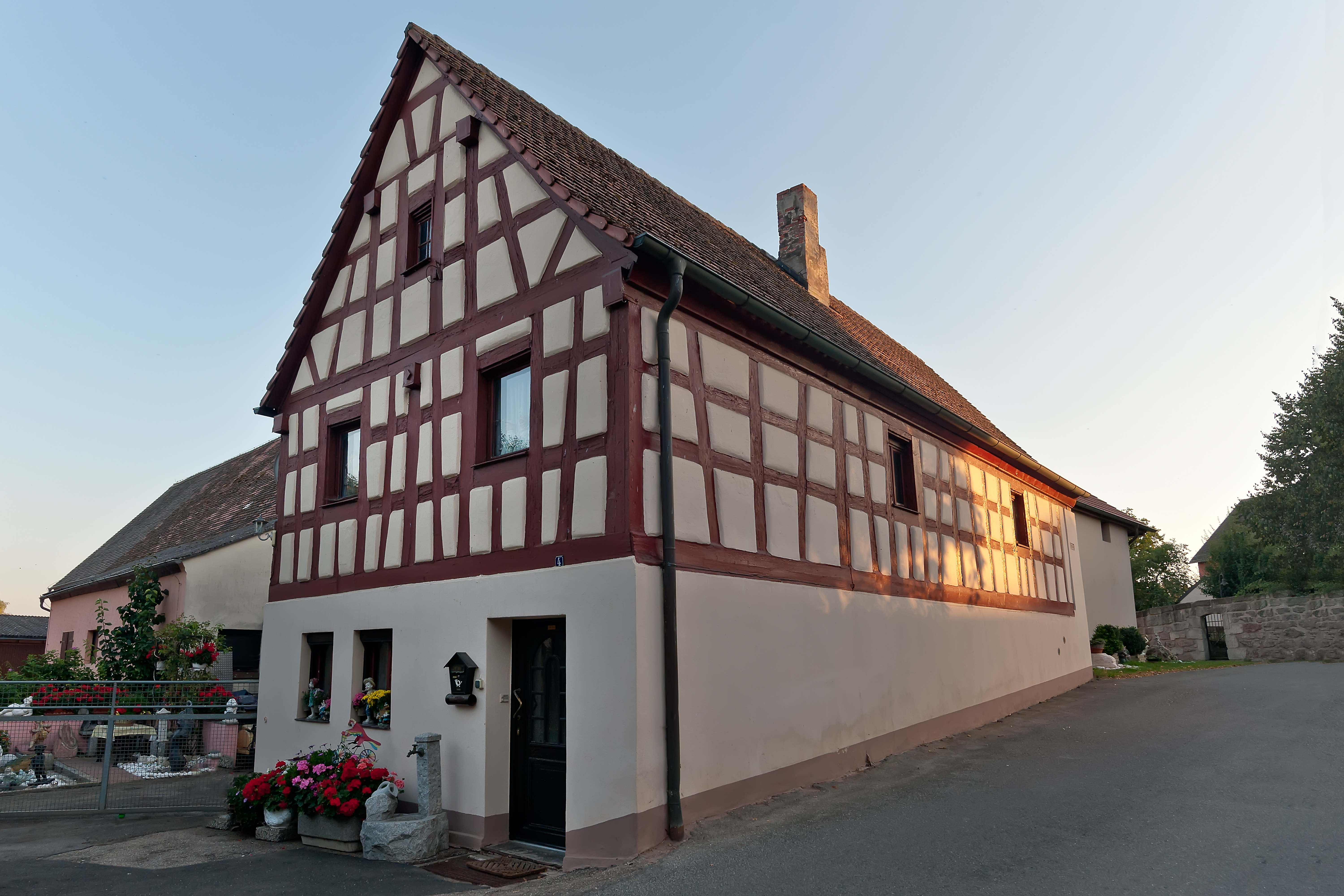 Altes Gasthaus Zautendorf This is a photograph of an architectural monument.